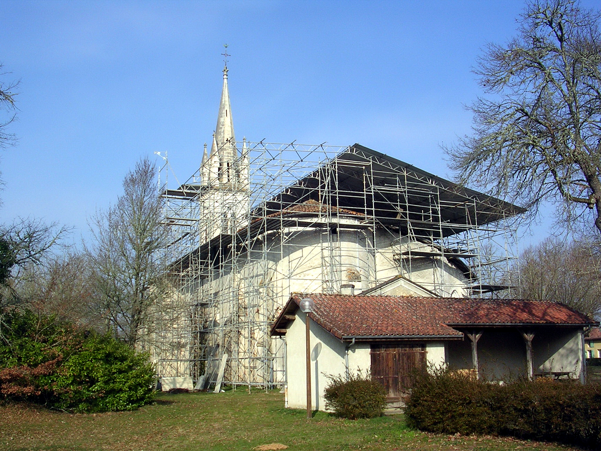 Église Saint-Martin de Commensacq, dans le département français des Landes